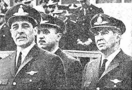 El Brigadier Mayor Adolfo Teodoro Álvarez (izquierda) el 27 de mayo de 1966, día en el que tuvo la ceremonia en la cual juró como titular de la Fuerza Aérea Argentina. A su derecha, el saliente titular, Brigadier General Carlos Armanini.